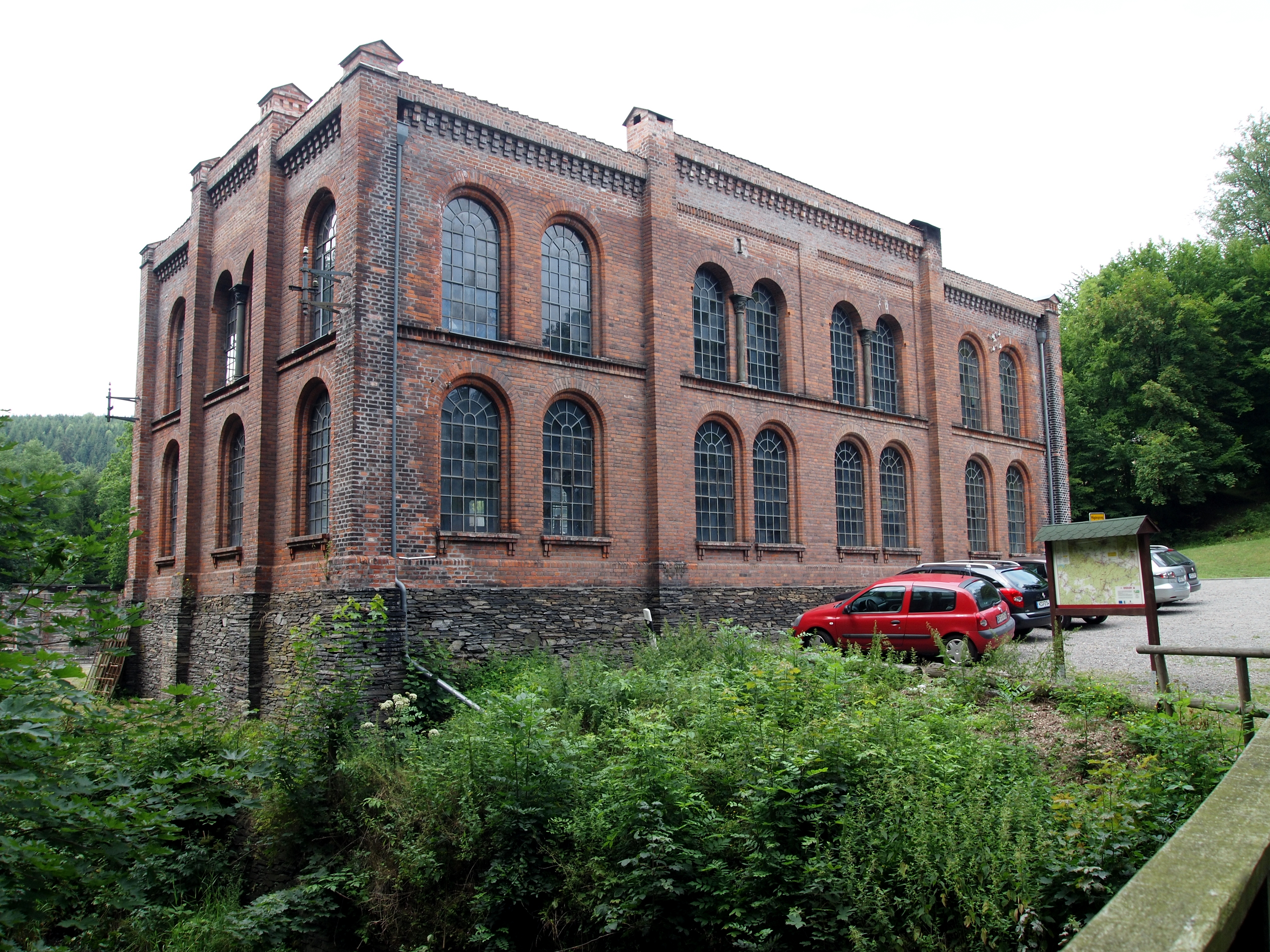 Carlswerk Mägdesprung, heute Museum (Stadt Harzgerode, Landkreis Harz; Sachsen-Anhalt)